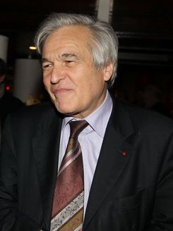 Pierre André Périssol, ministre du logement